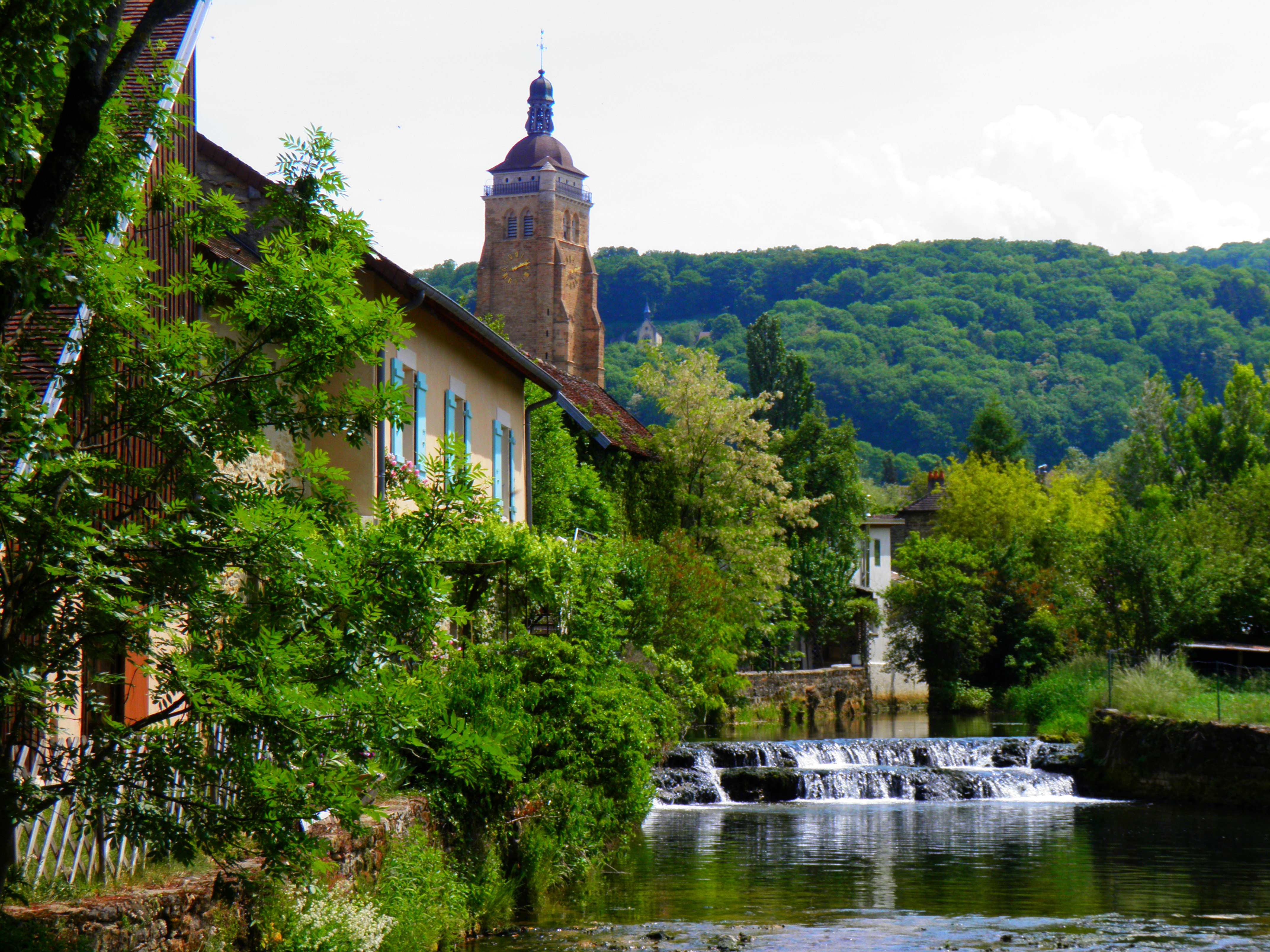 Rivière et village d'Arbois (Jura, France).